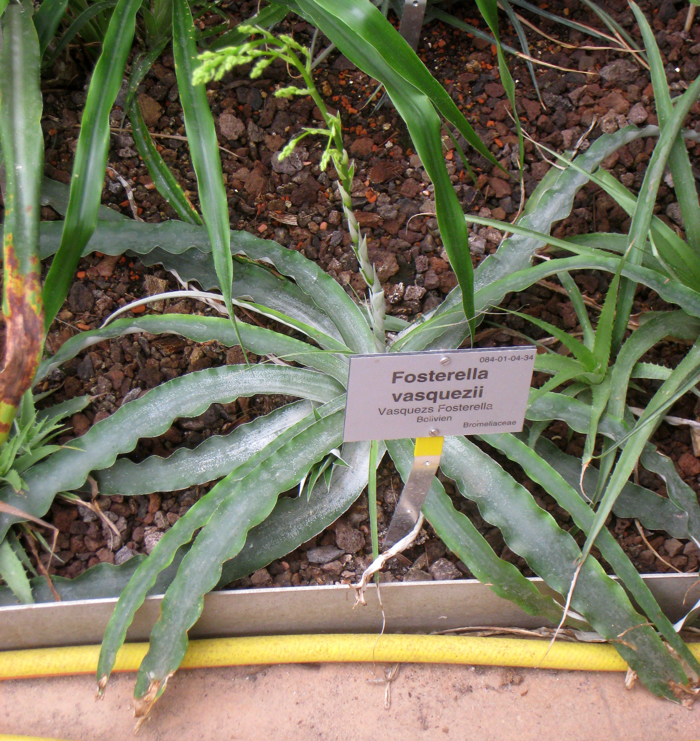 Fosterella vasquezii specimen in the Botanischer Garten, Berlin-Dahlem (Berlin Botanical Garden), Berlin, Germany.